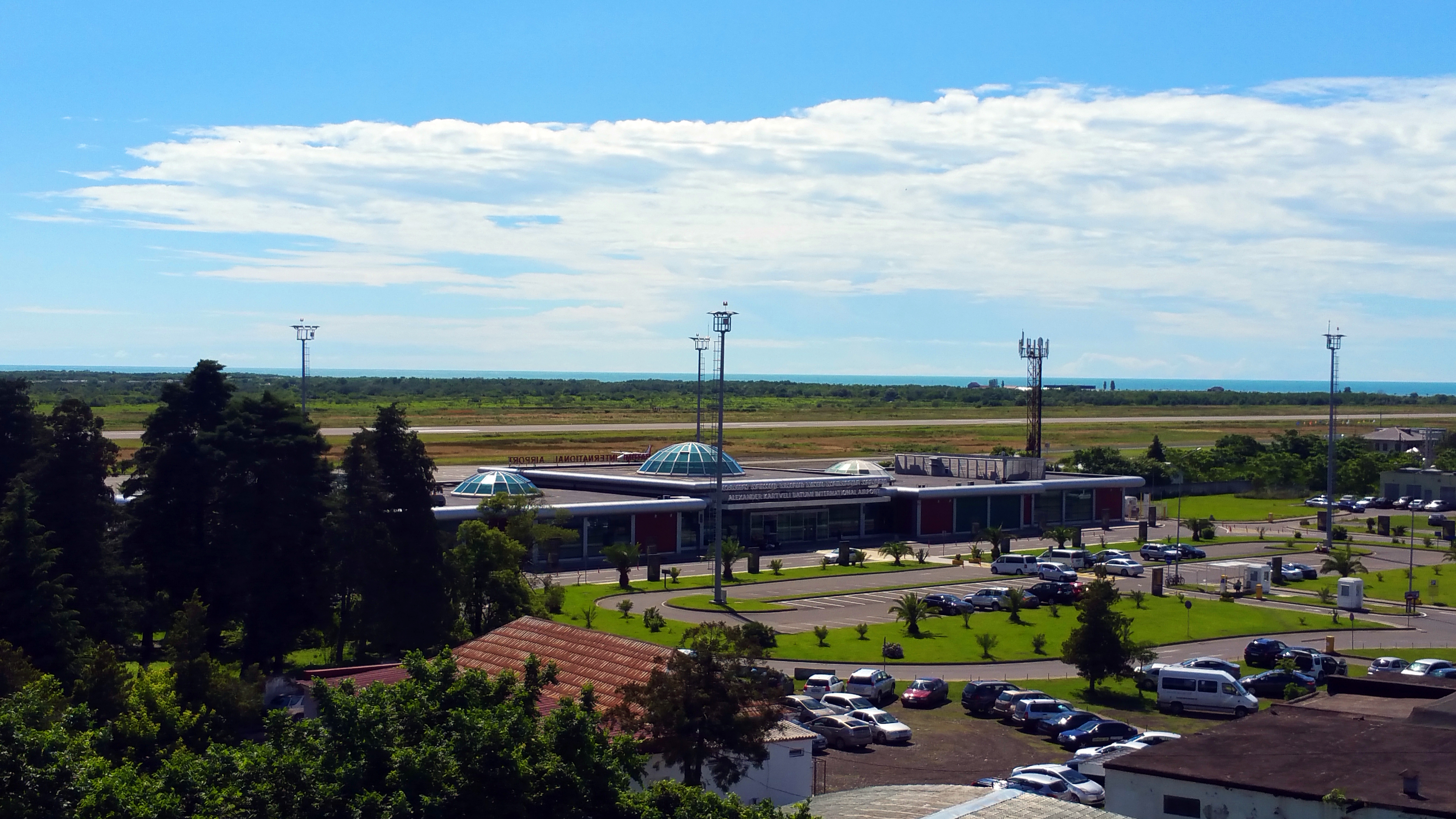 ბათუმის აეროპორტი